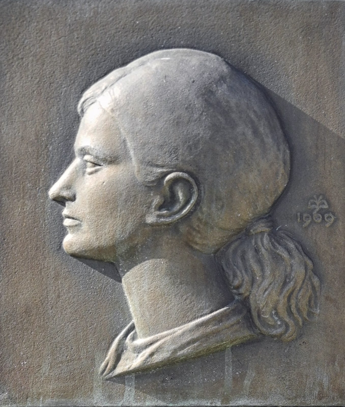 Reljef Ružice Meglaj Rimac na Mirogoju